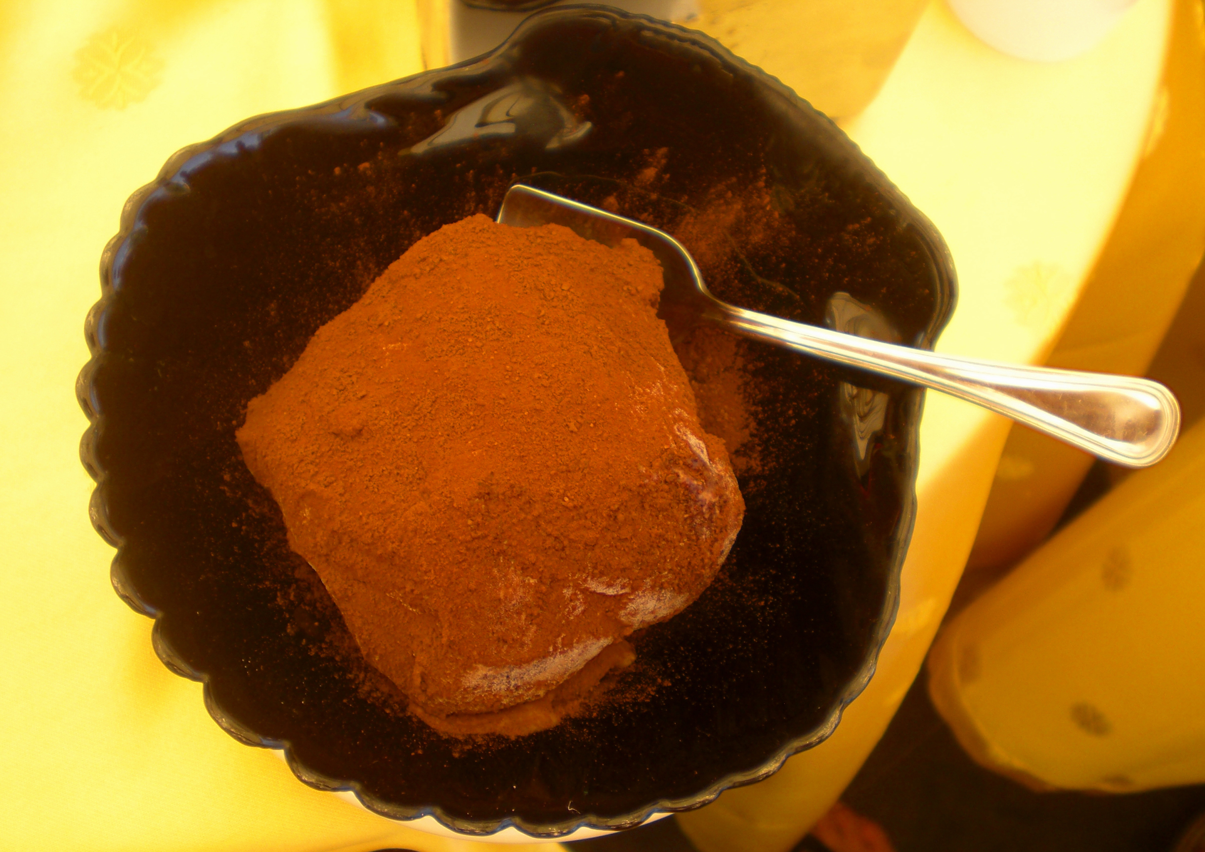 Creato dai gelatai pizzitani, il tartufo di Pizzo è un gelato al gusto di nocciola e cioccolato, ricoperto di cacao in polvere# Rappresenta un dei fiori all'occhiello della cucina tipica calabrese#